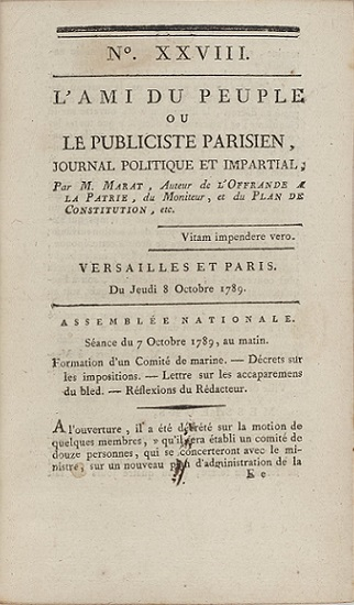 L'Ami du peuple